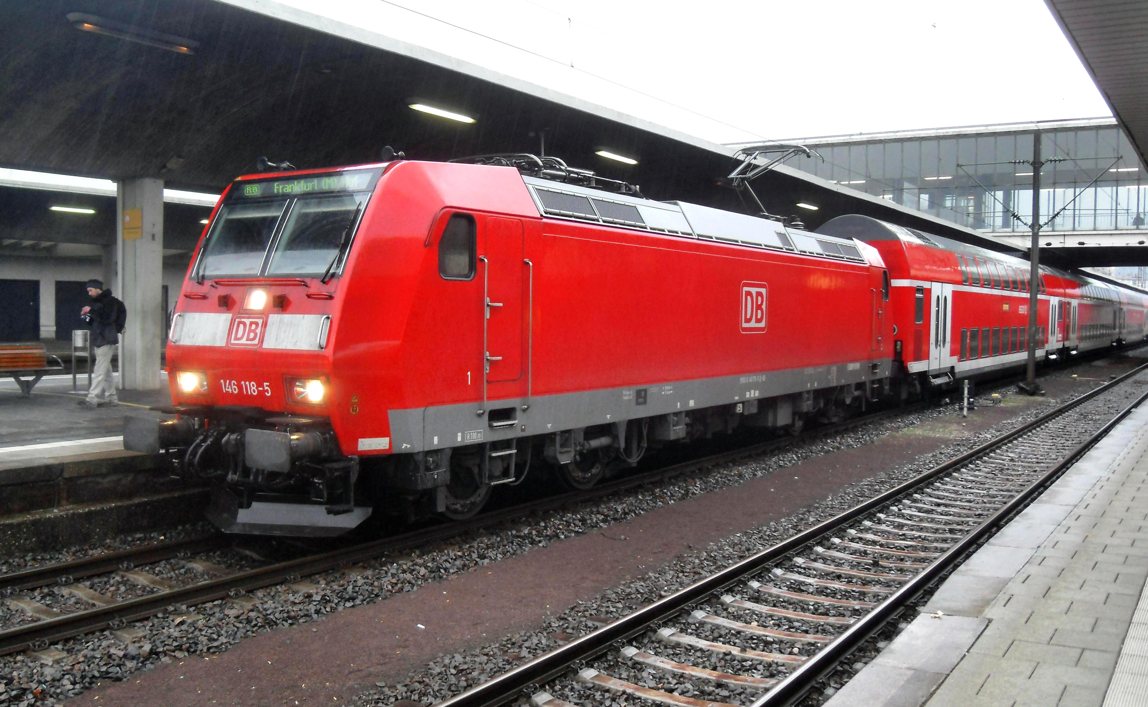 RegionalBahn mit Elektrolokomotive der DBAG-Baureihe 146 (Bombardier Traxx) im Heidelberger Hauptbahnhof (Baden-Württemberg) auf dem Weg nach Frankfurt (Main) Hauptbahnhof (Hessen) über die Main-Neckar-Eisenbahn in Deutschland